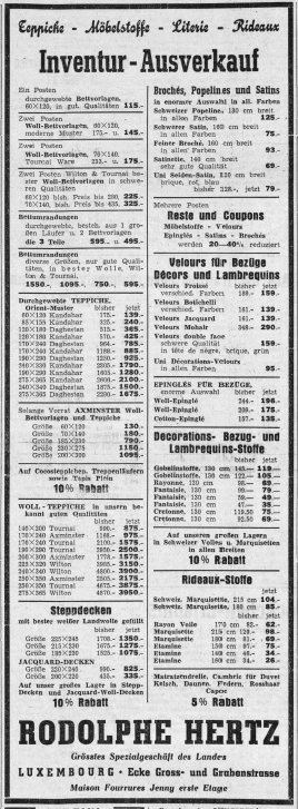 Publicité Rodolphe Hertz du 15 janvier 1948, parue au Escher Tageblatt.